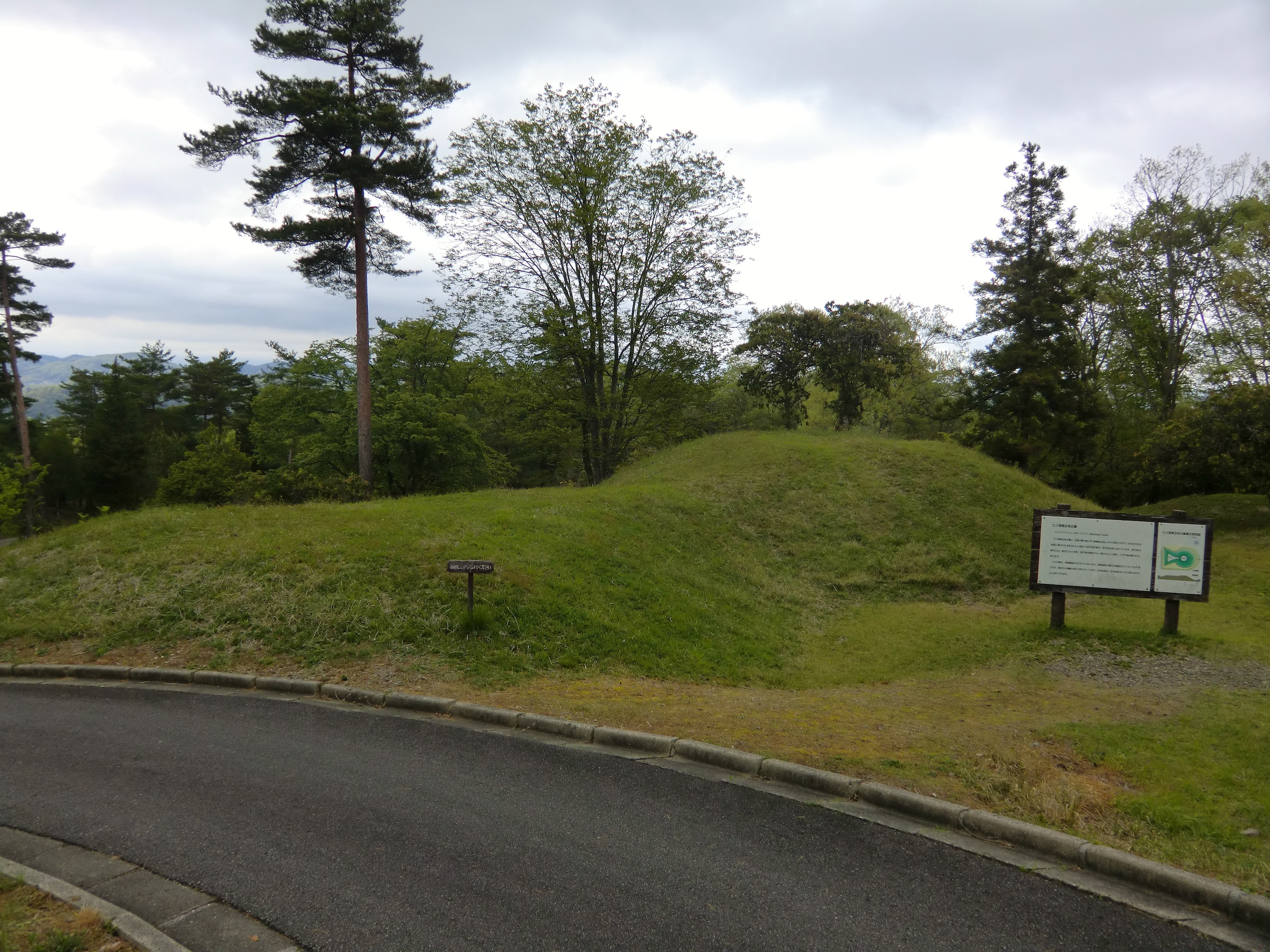 みよし風土記の丘内にある七ツ塚第9号古墳（三次市）